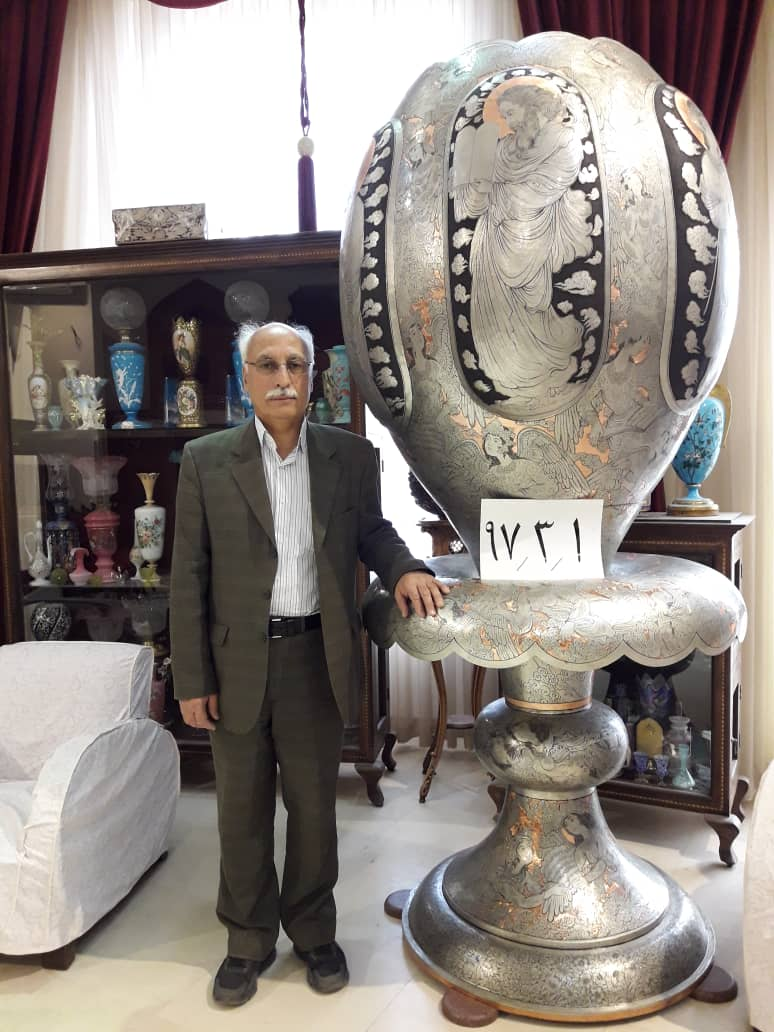 بهرام الیاسی در کنار یکی از آثار قلمزنی خود